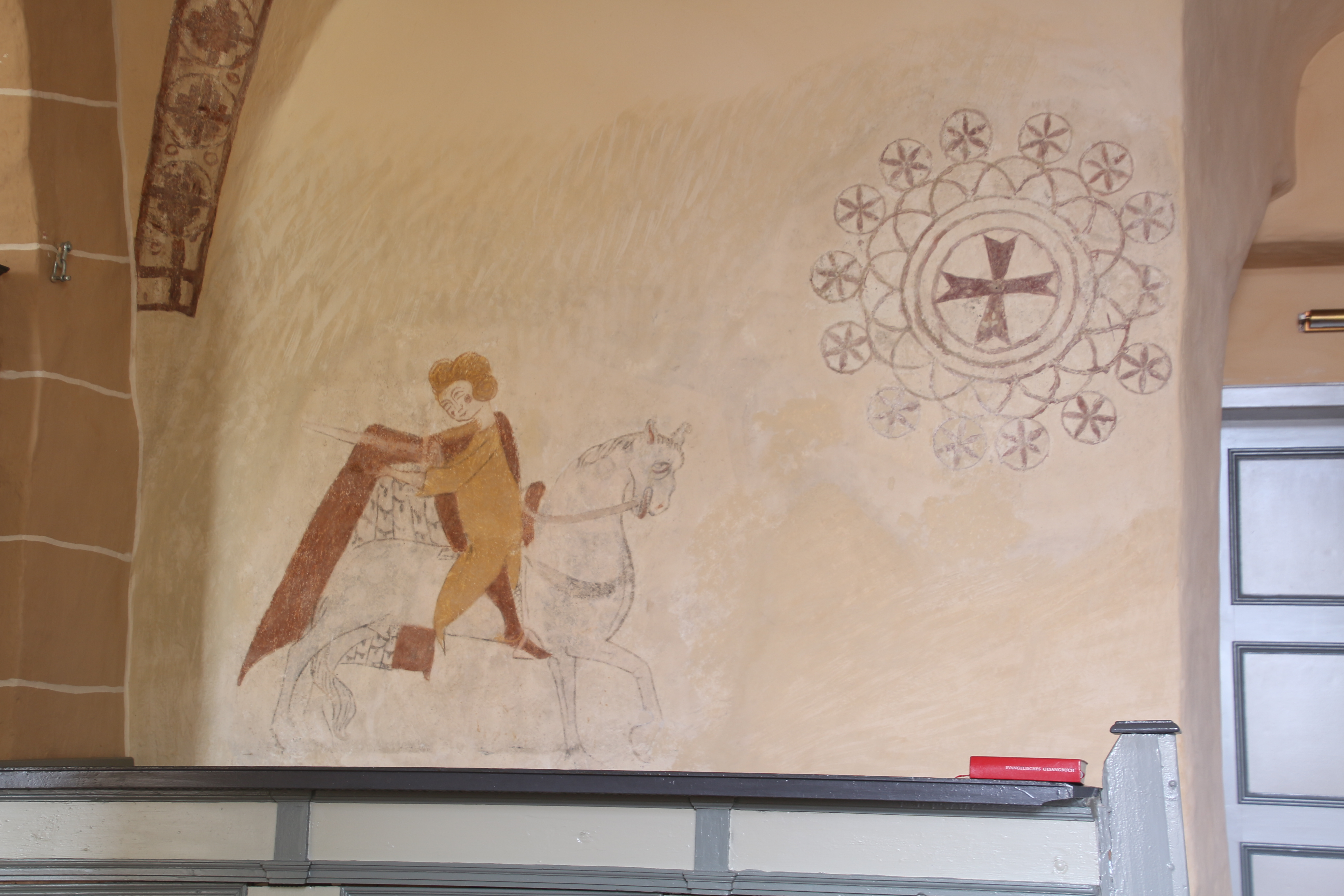 Evangelische Kirche Breidenbach, Landkreis Marburg-Biedenkopf, Hessen